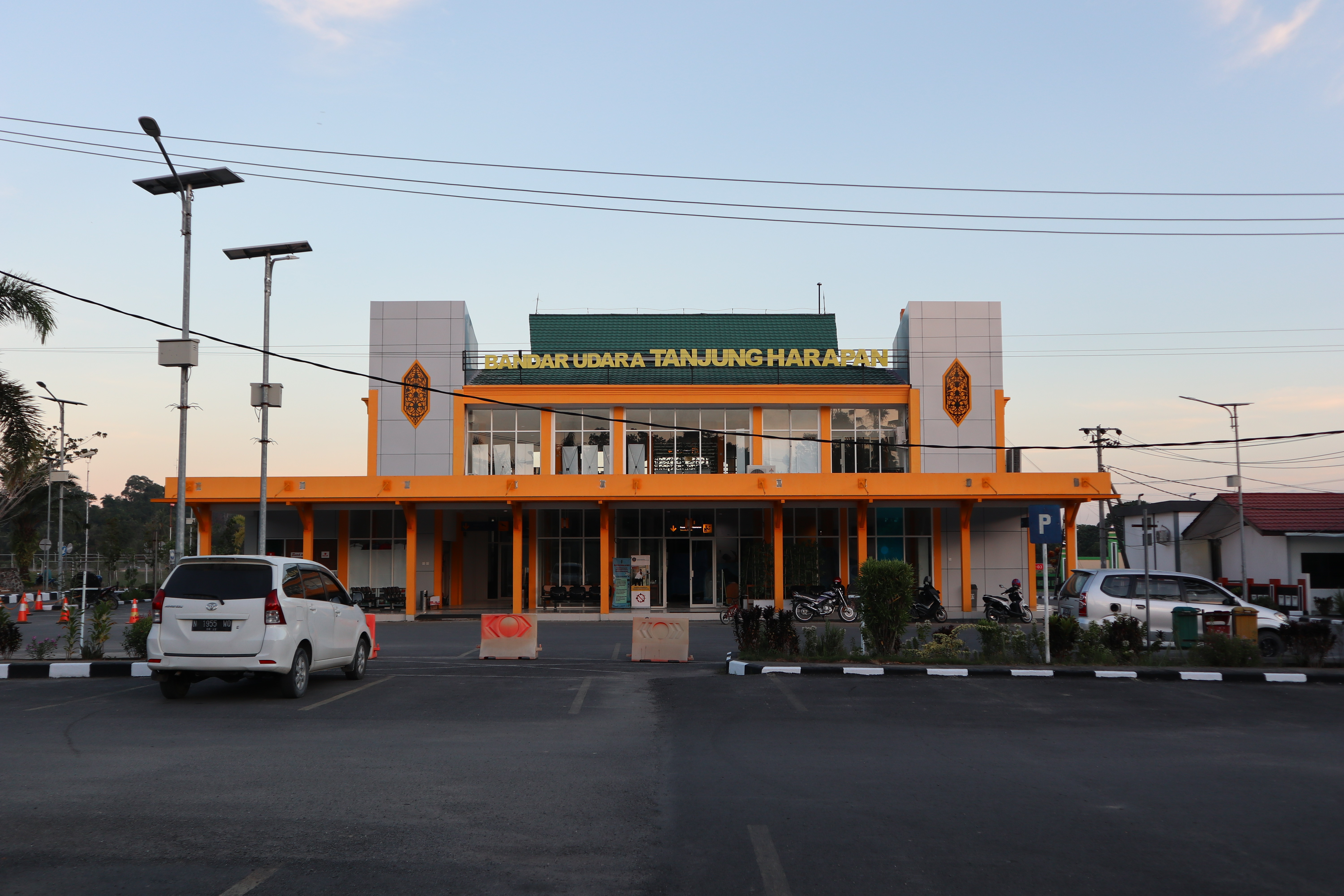 Terminal Penumpang Bandar Udara Tanjung Harapan kota Tanjung Selor, Kabupaten Bulungan.